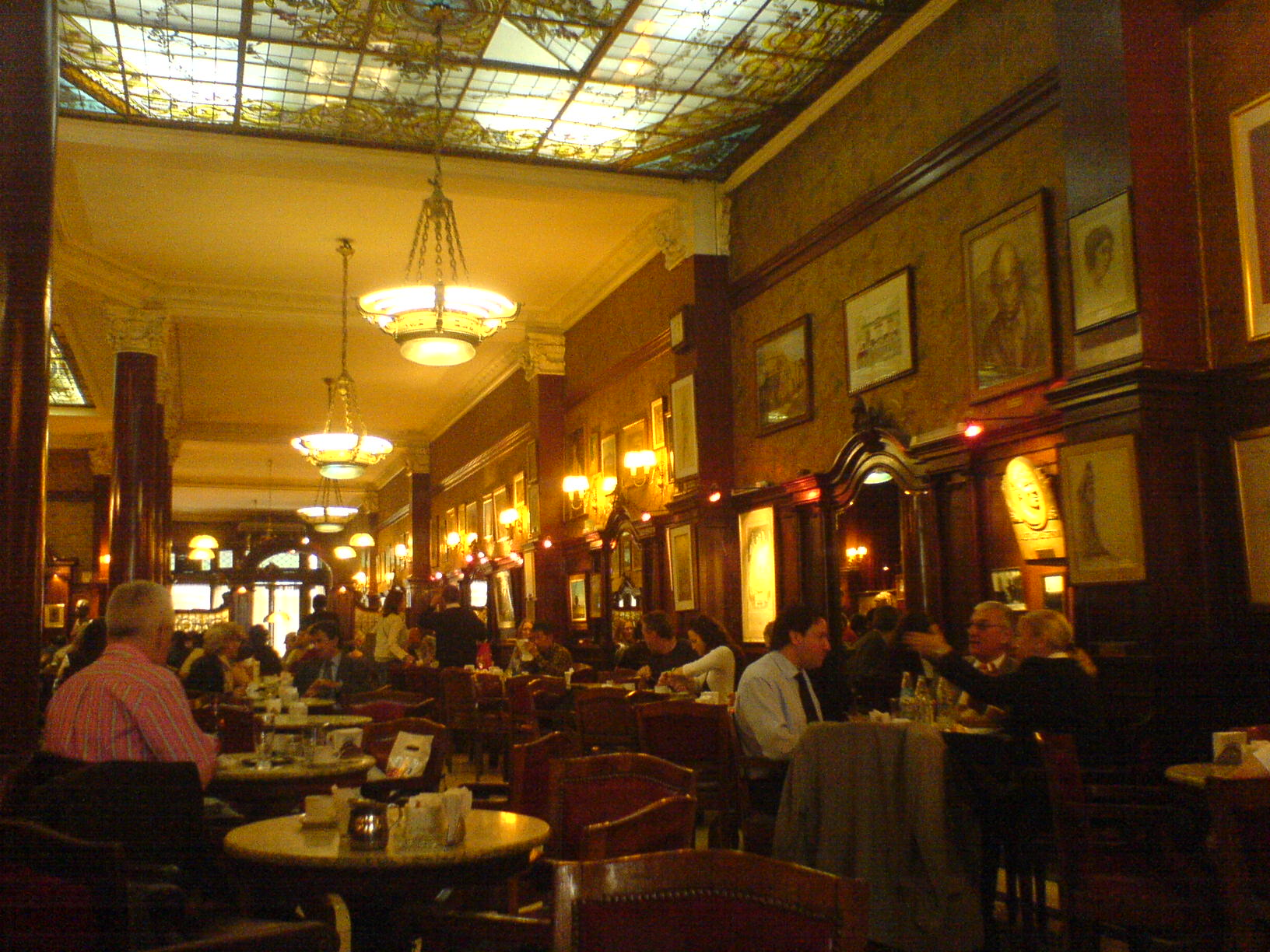 Cafe Tortoni, Buenos Aires.